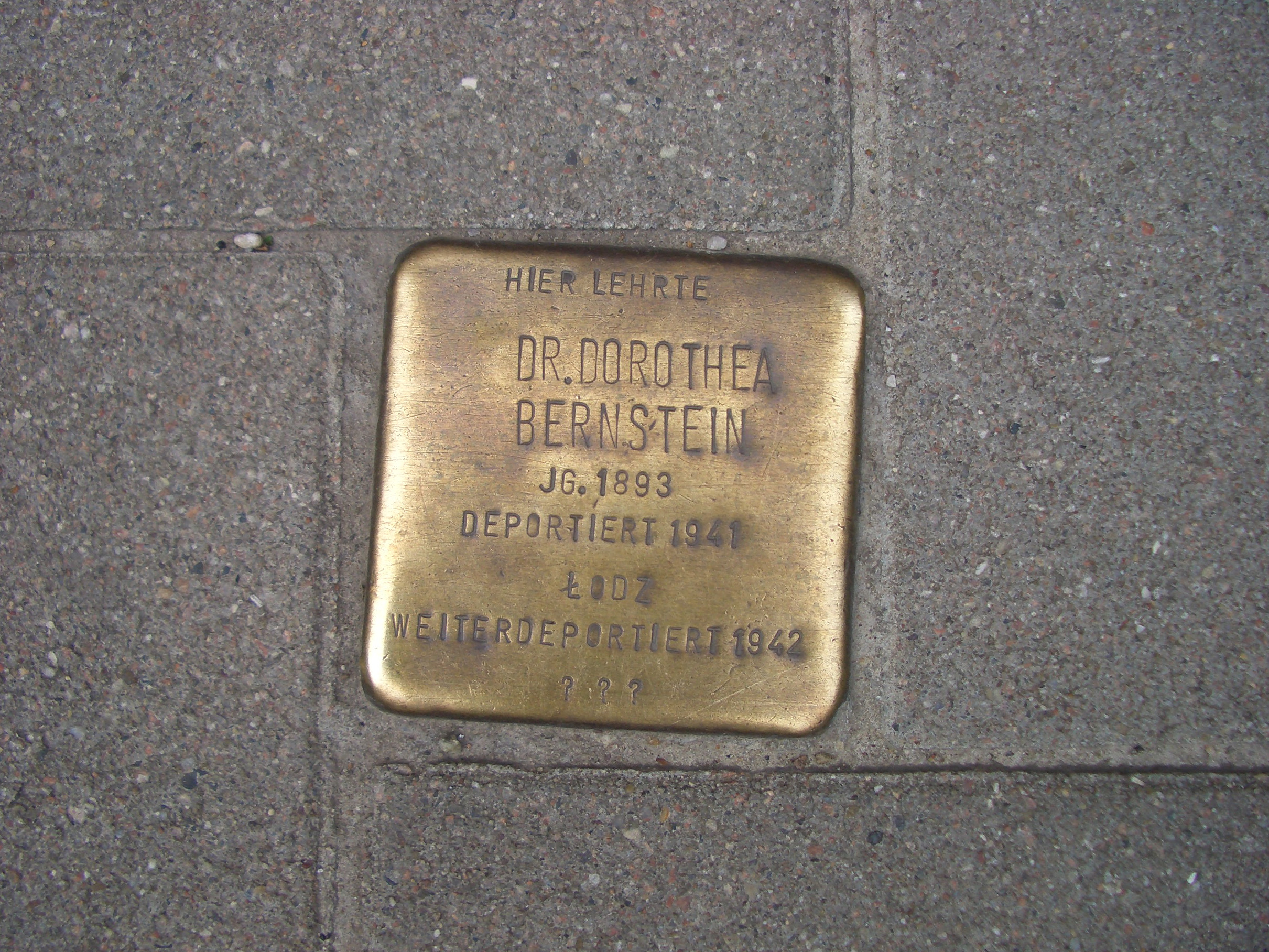 Stolperstein für Dr. Dorothea Bernstein vor dem Gymnasium Lerchenfeld in Hamburg-Uhlenhorst.